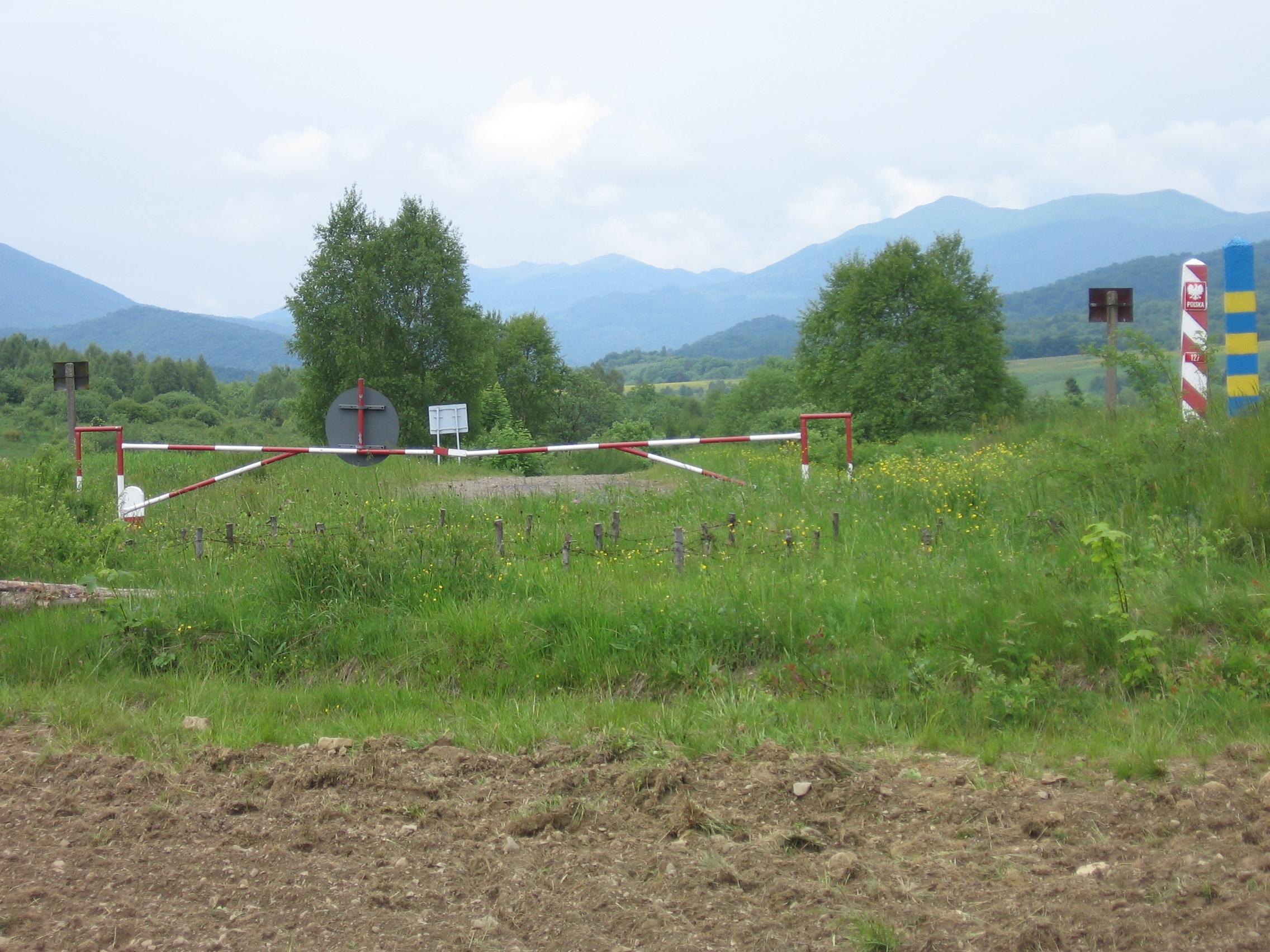 Przełęcz Beskid nad Wołosatem widok od strony ukraińskiej